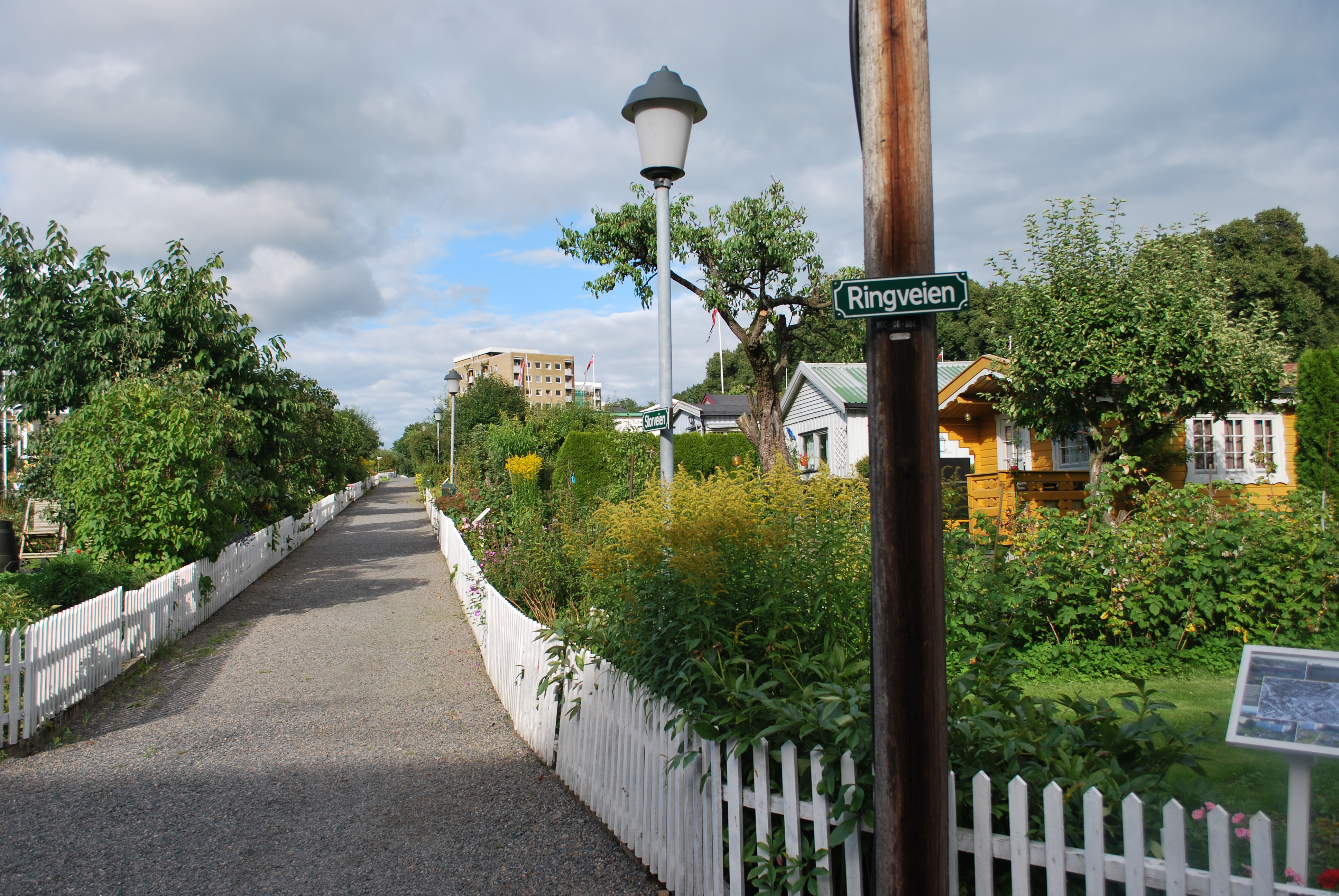 Hjemmets kolonihager, Bjølsen, Oslo, sett fra "Ringveien"